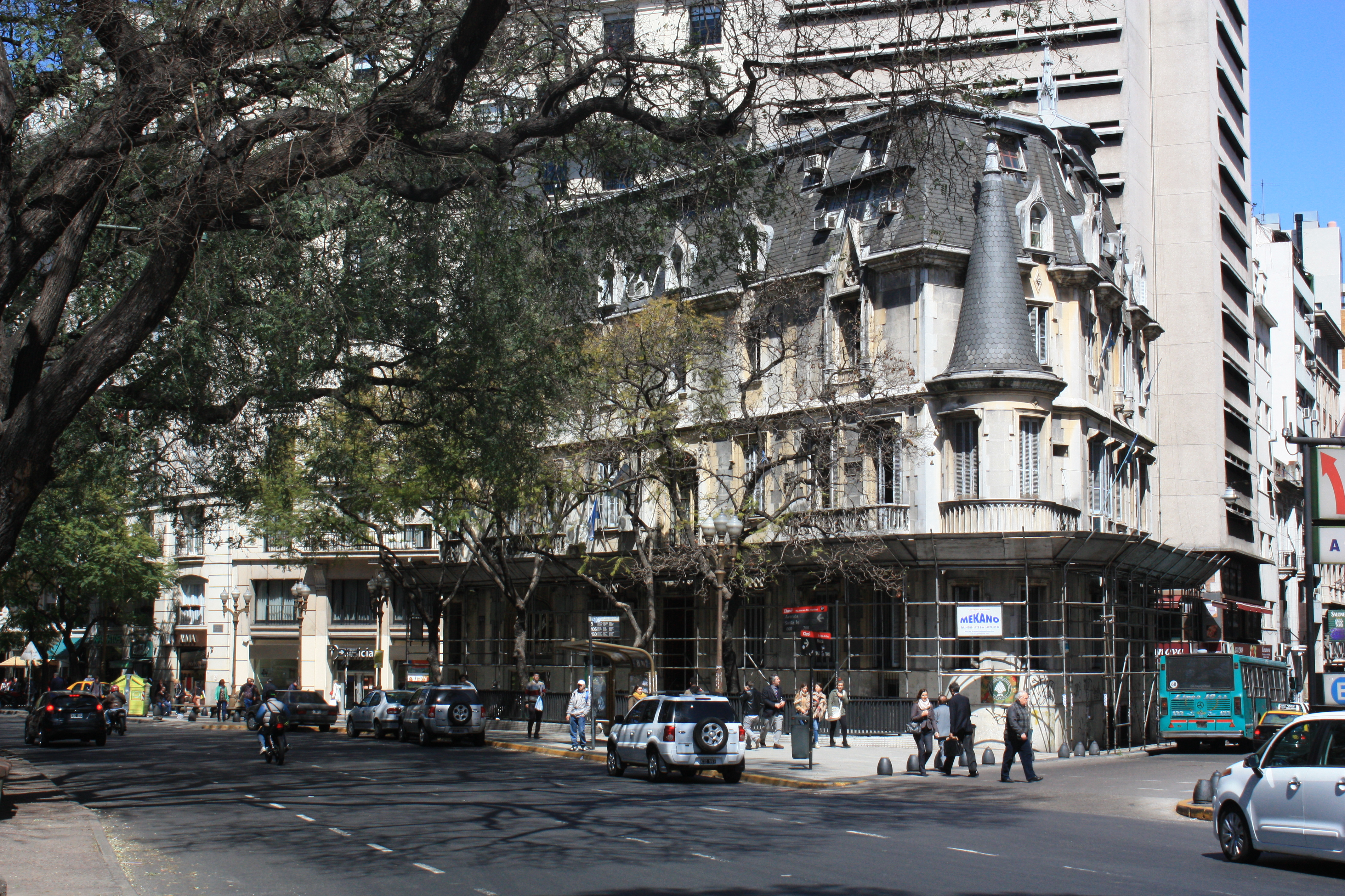 Administración de Parques Nacionales